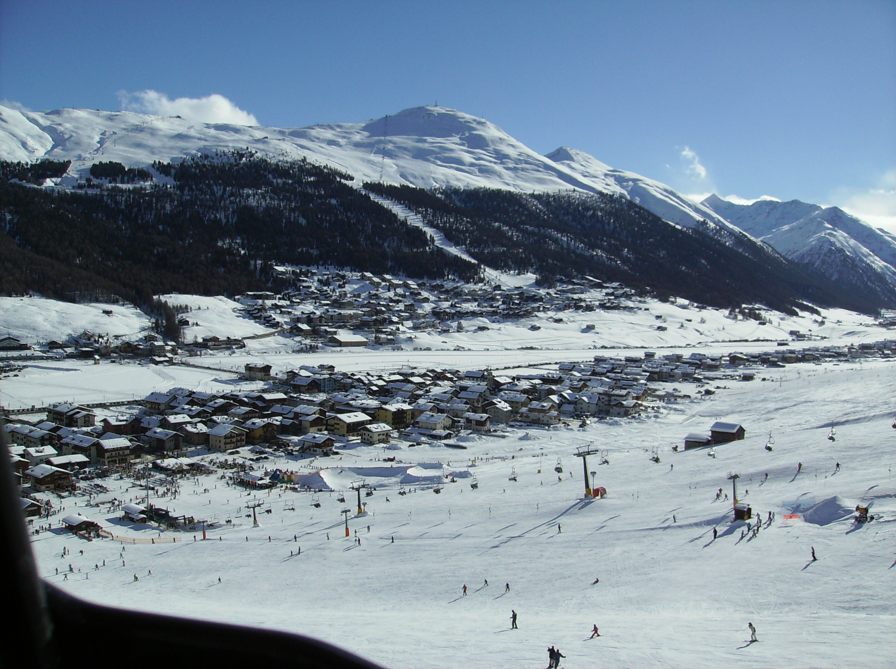 Livigno Valandrea vue telecabine